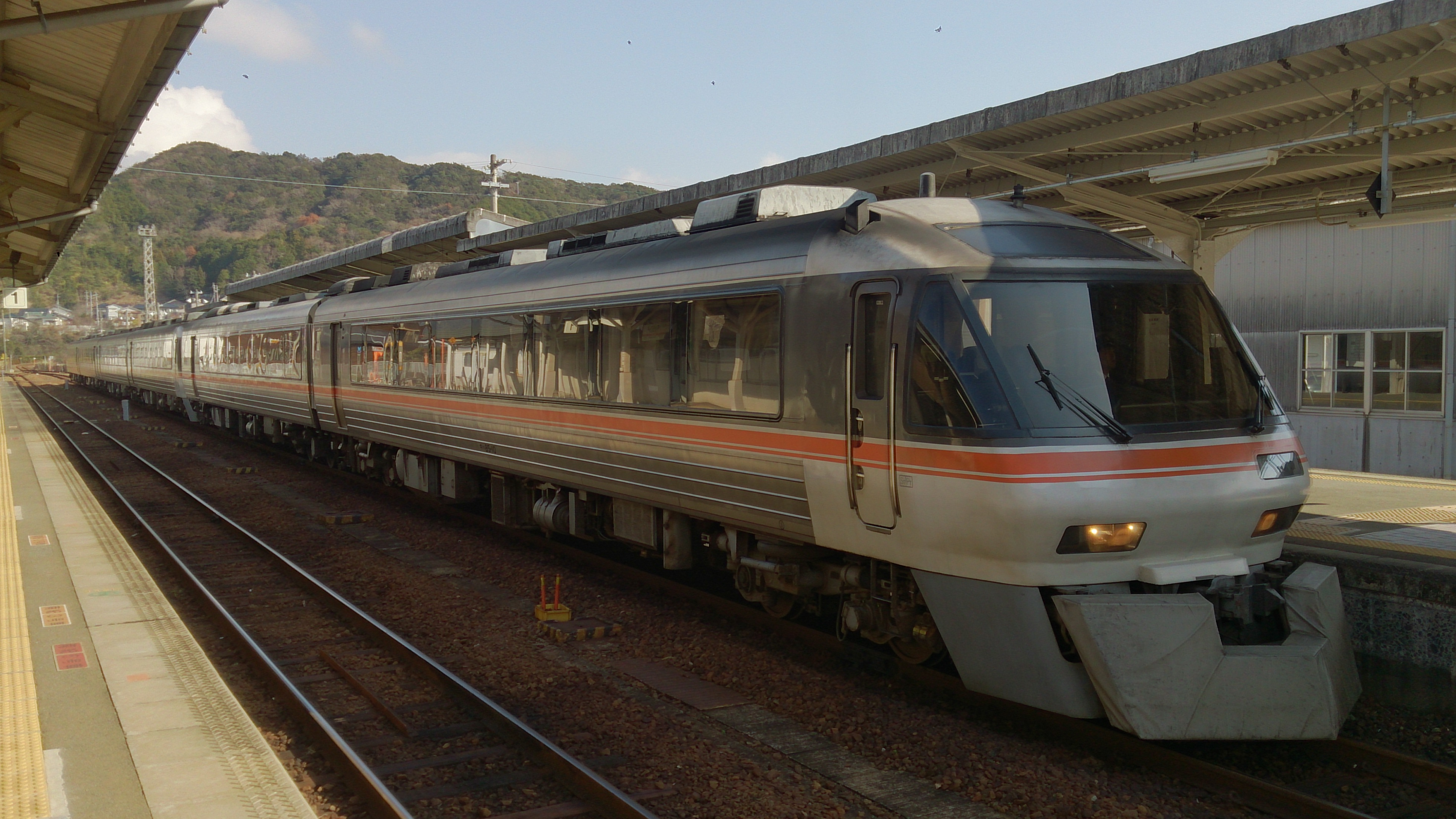 撮影日:2014年1月3日 撮影場所:紀伊長島駅